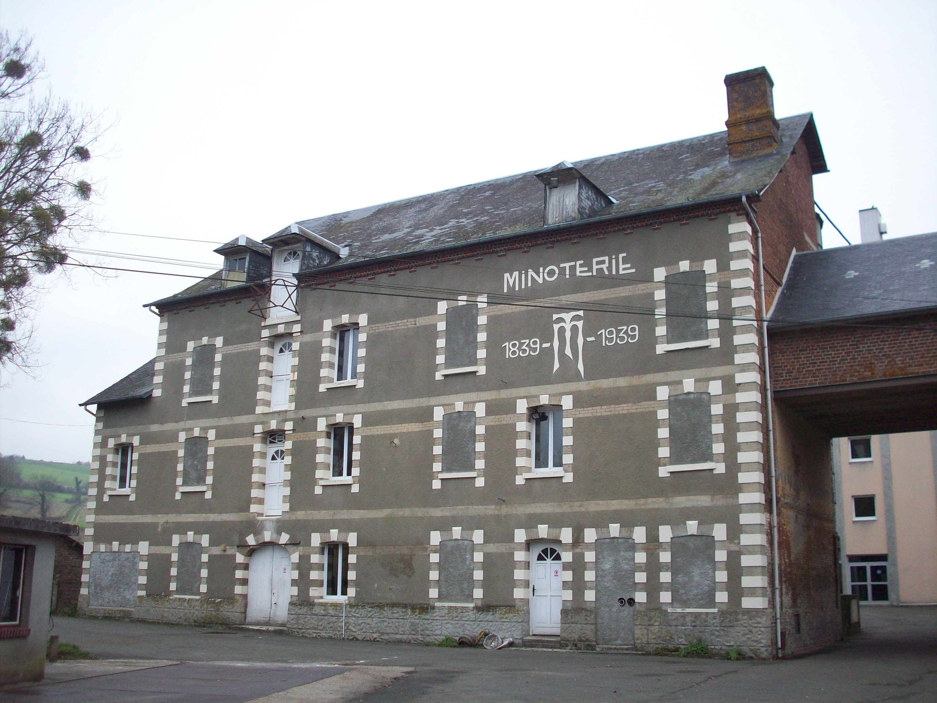 Moulin de l'Andelle, à Morville-sur-Andelle.